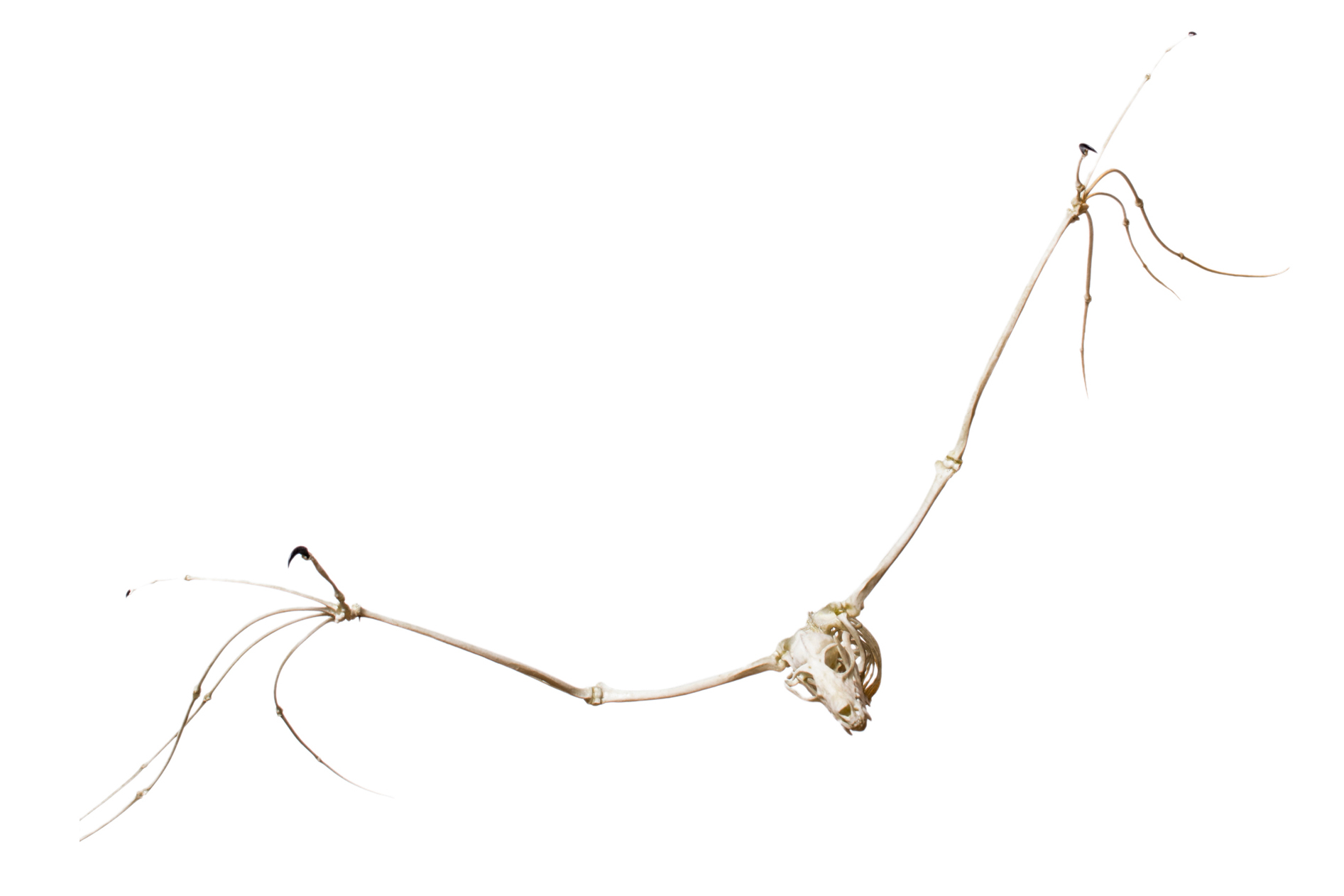 Great flying fox. Skeleton. Replica.